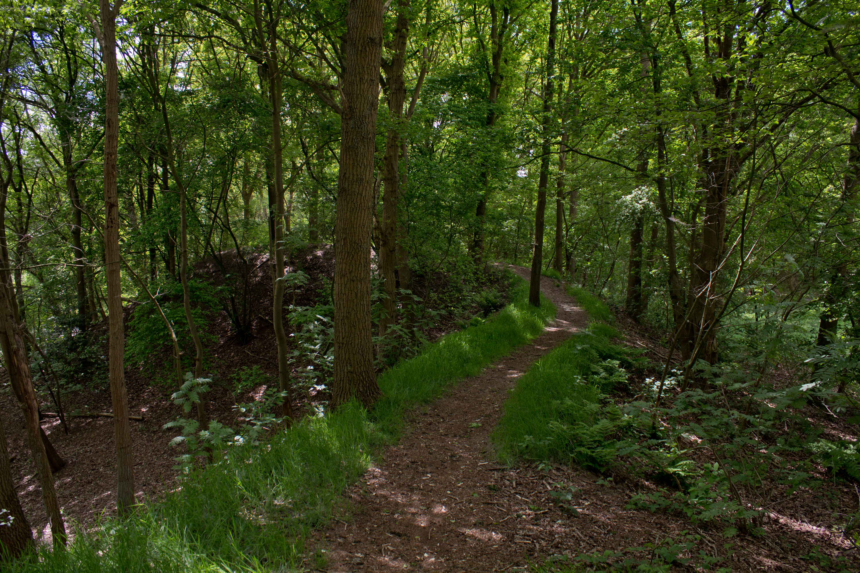 Spinolaschans. Zuidwestelijk bastion